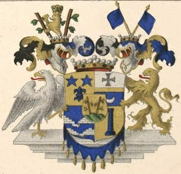 Stackelbergi suguvõsa vabahärravapp (Tumala liin)